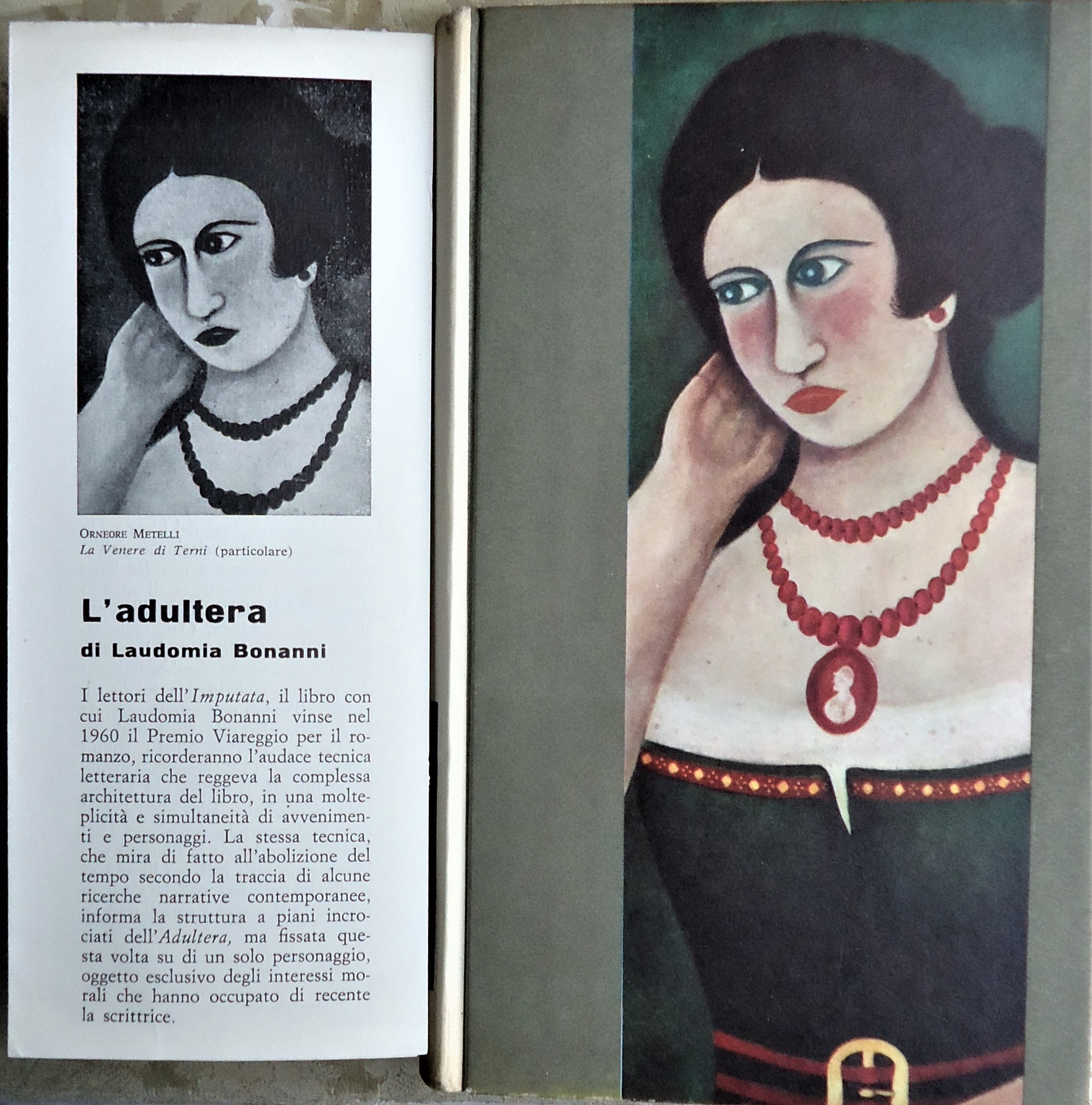 Prima edizione del romanzo di Laudomia Bonanni "L'Adultera" ( Bompiani, 1964). Copertina con dipinto di Orneore Metelli (Terni, 2 giugno 1872 – Terni, 26 novembre 1938). Foto priva della sovracopertina di plastica trasparente. (Coll. Fausta Samaritani-prime edizioni).